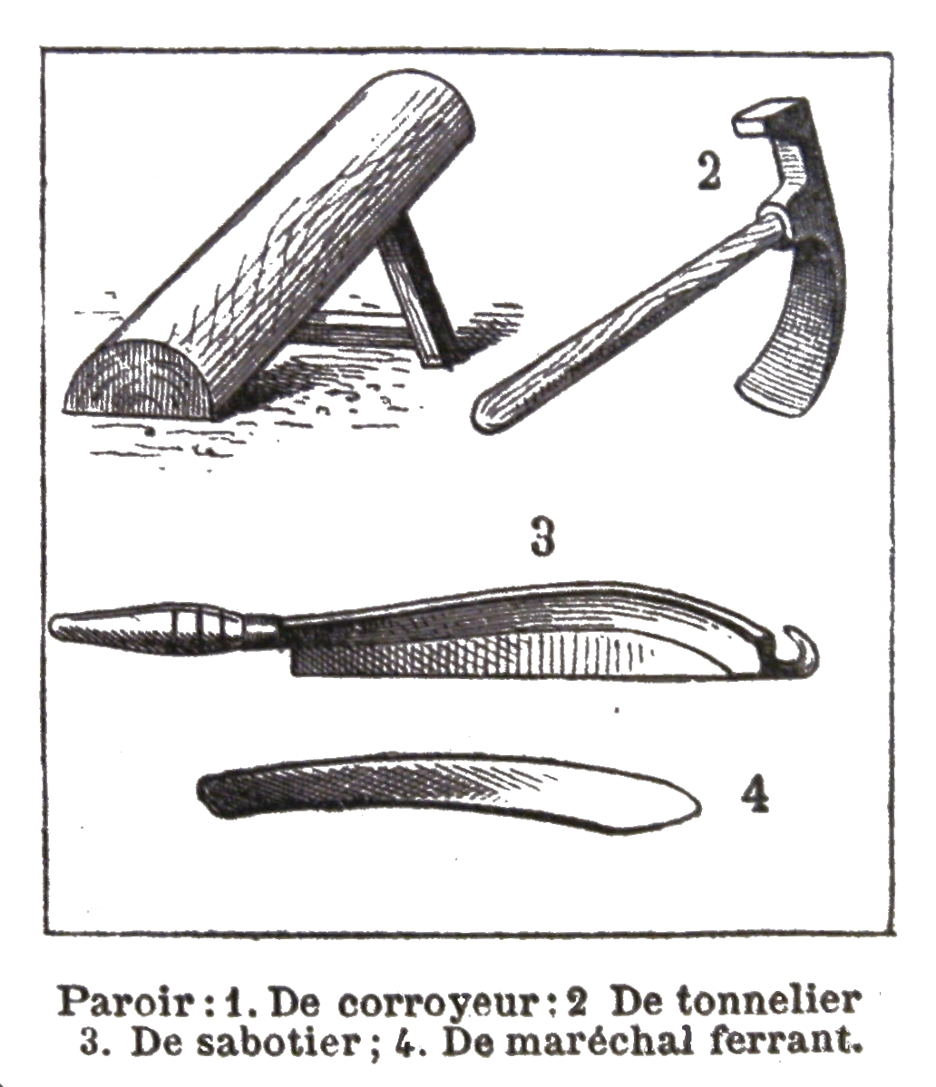 Gravure représentant des paroirs gravure anonyme extraite du Grand Dictionnaire universel du XIXe siècle, en 15 volumes (1868-1877) et 2 volumes de suppléments (1878-1888) de Pierre Larousse.